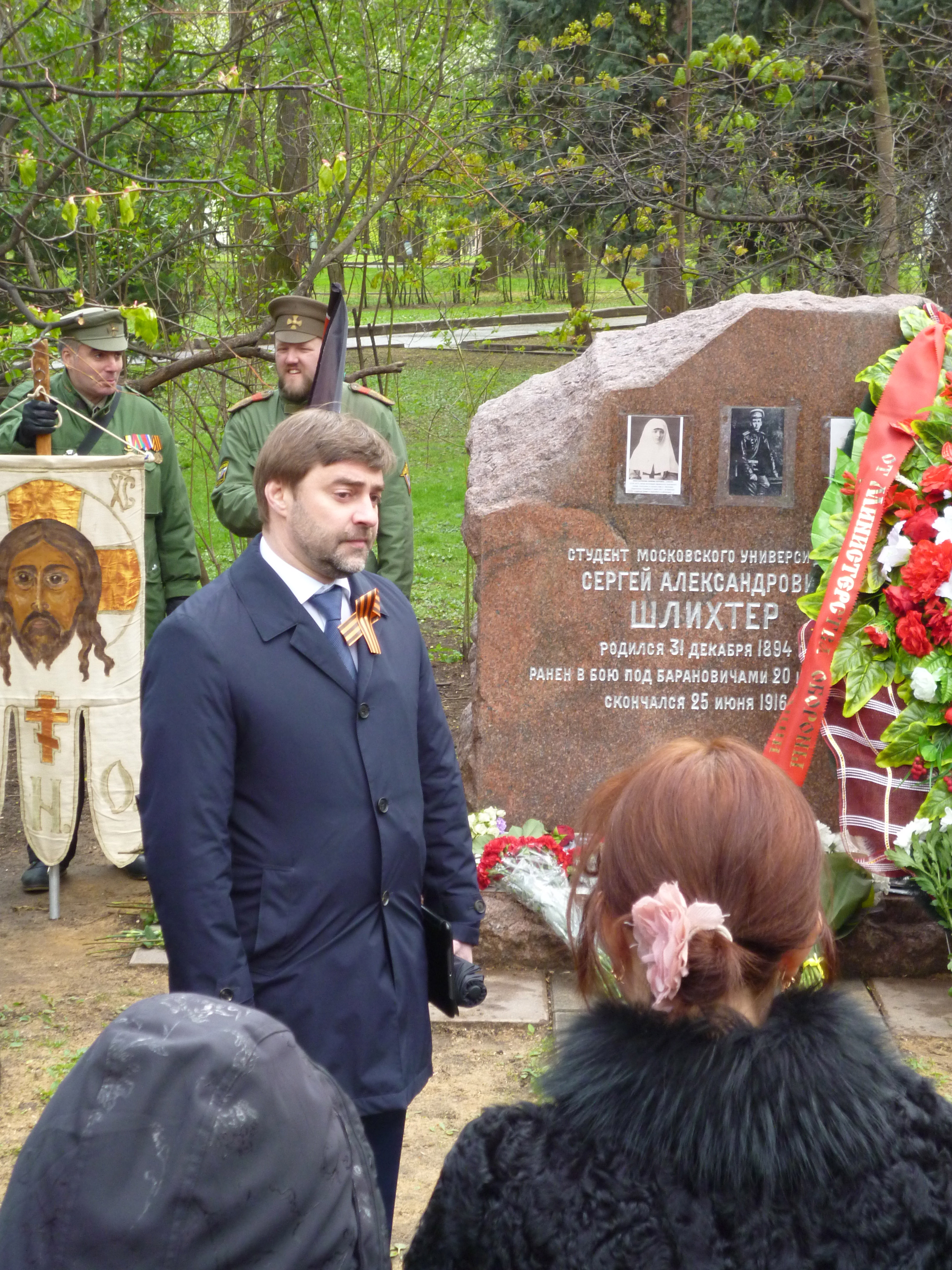 Церемония открытия памятной плиты "Сёстрам милосердия" Ольге Шишмарёвой и Вере Семёновой, погребённым на Братском кладбище у могилы студента Московского университета Сергея Шлихтера, погибшего под Барановичами в 1916 году.